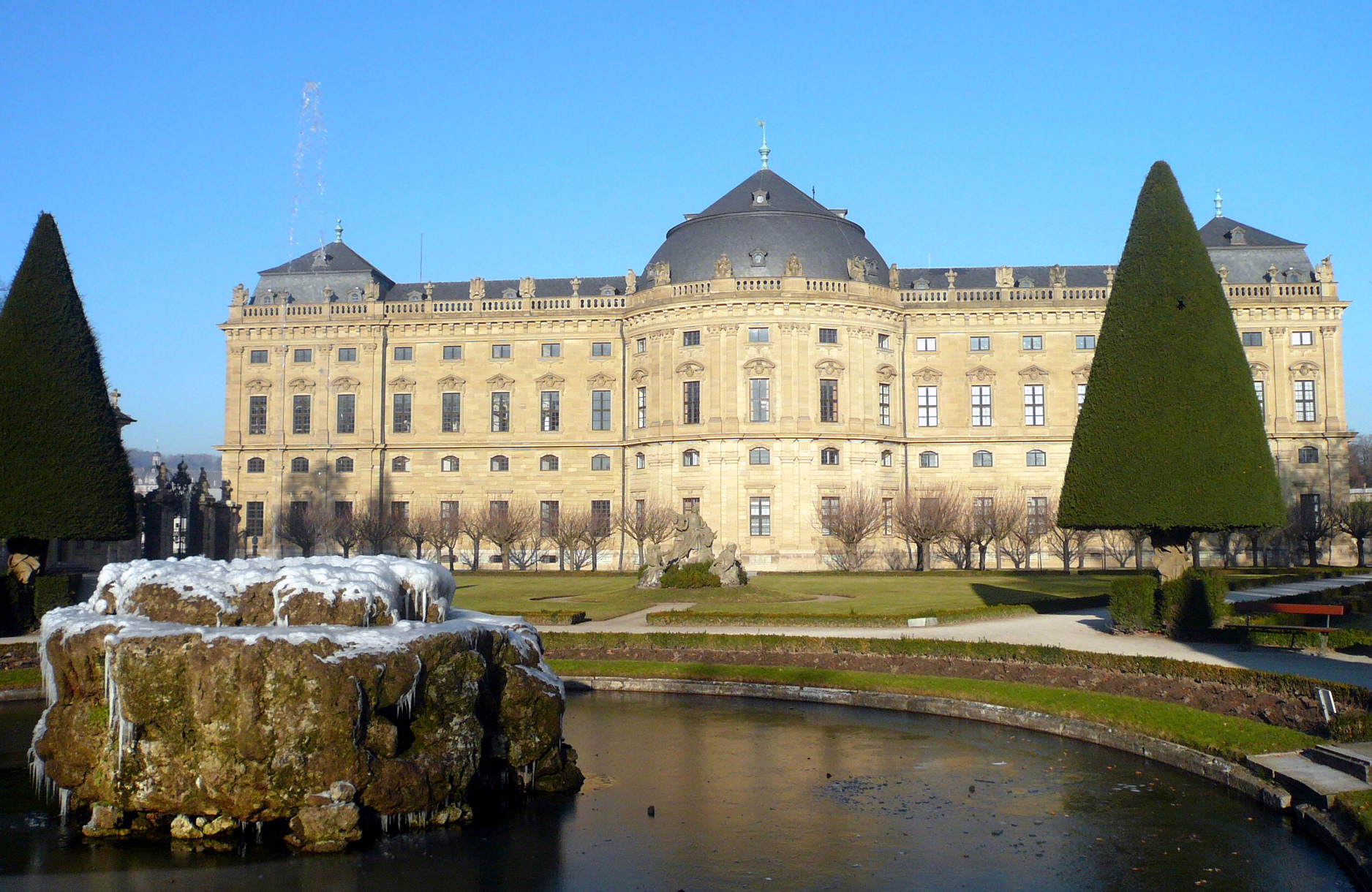 Südseite der Würzburger Residenz